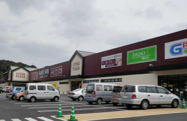 佐賀県多久市のショッピングセンター Food way